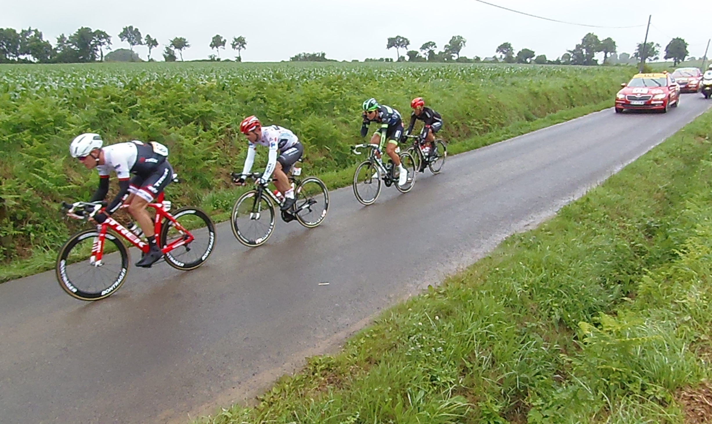 2e étape du Tour de France 2016, à Percy (km 35, Normandie, France). Les quatre échappés : Jesper Stuyven, Paul Voss (porteur du maillot à pois), Vegard Breen et Cesare Benedetti.